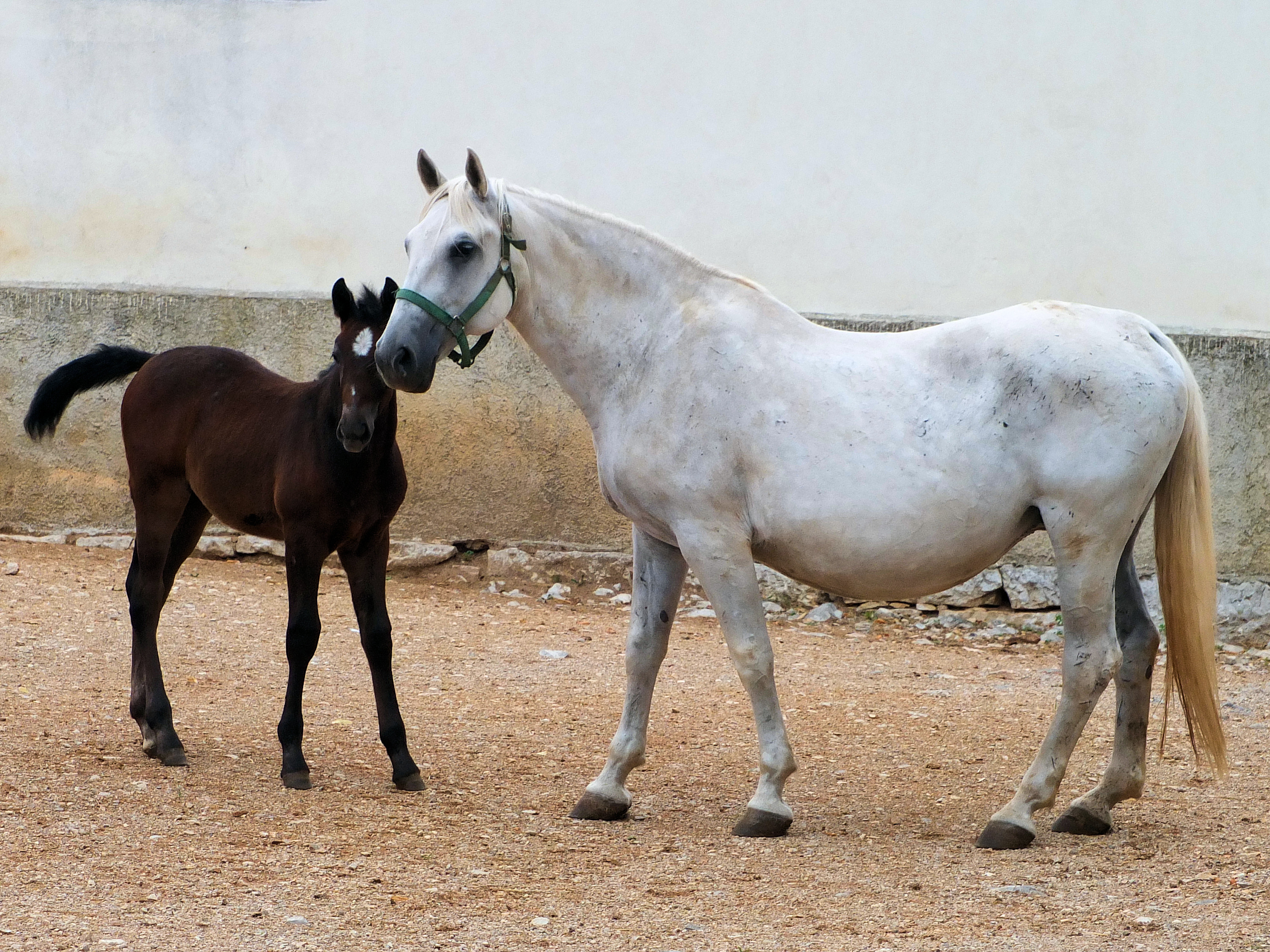 Lipica Stud Farm, Slovenia, June 2012